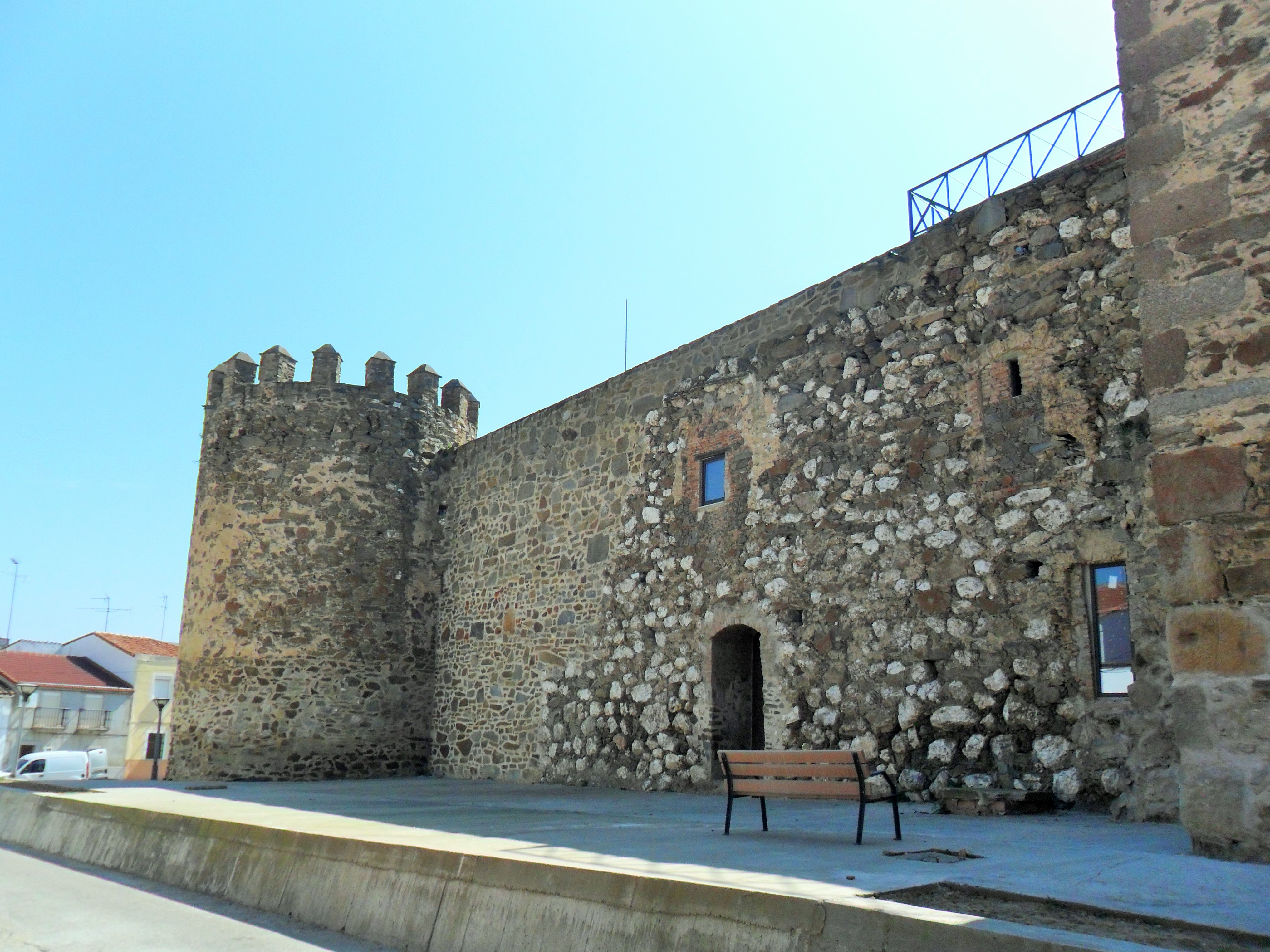 Palacio de los Orellana (o de Los Altamirano)